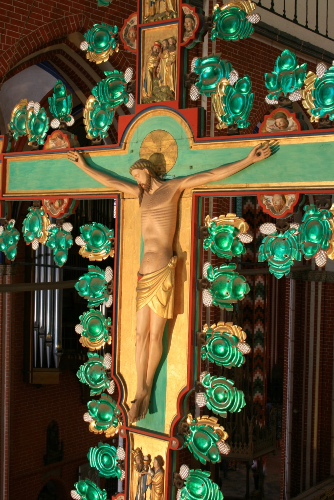 Kreuzaltar im Doberaner Münster (um 1360)_Christus am Kreuz